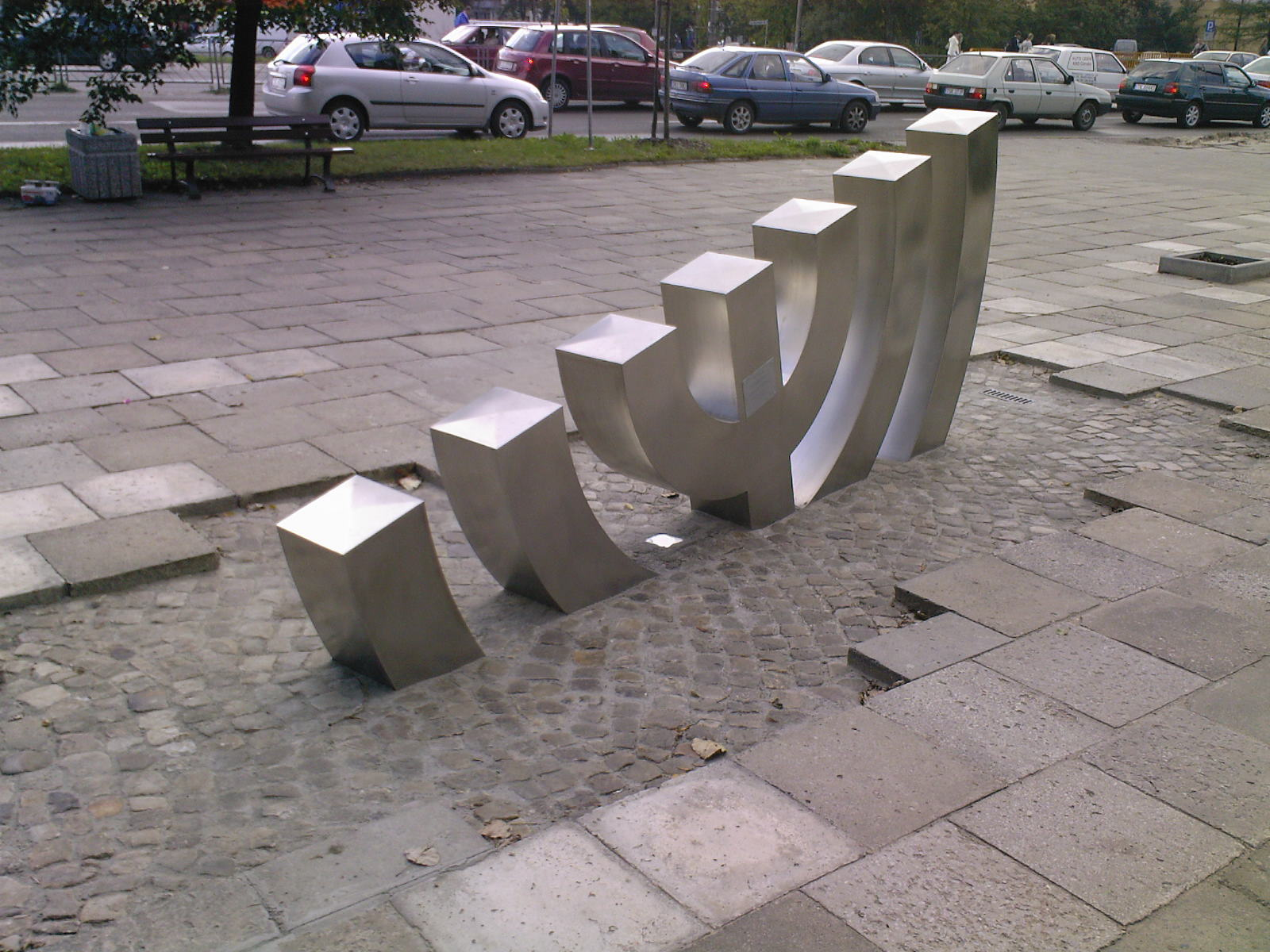 Pomnik ofiar kieleckiego getta. "Menora", autor: Marek Cecuła, 2007.